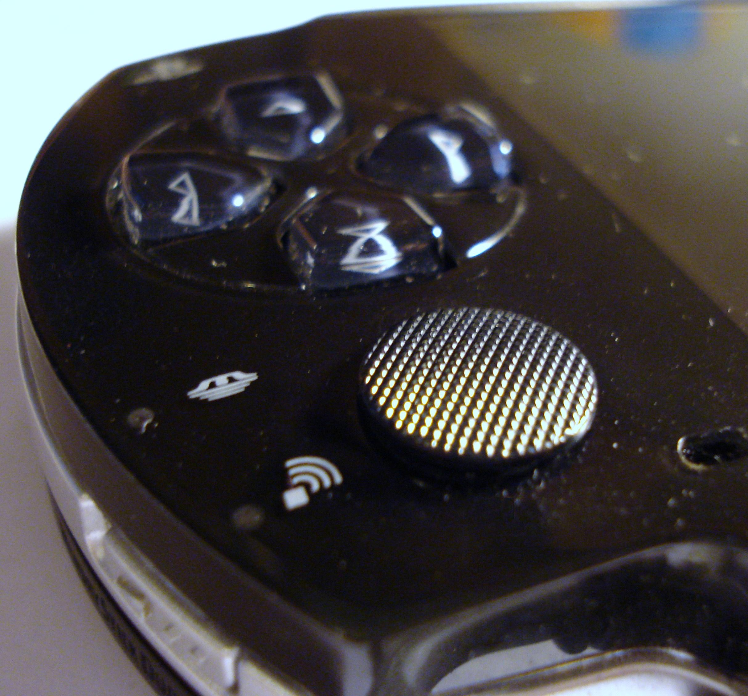 PSP-styrspak och knappar